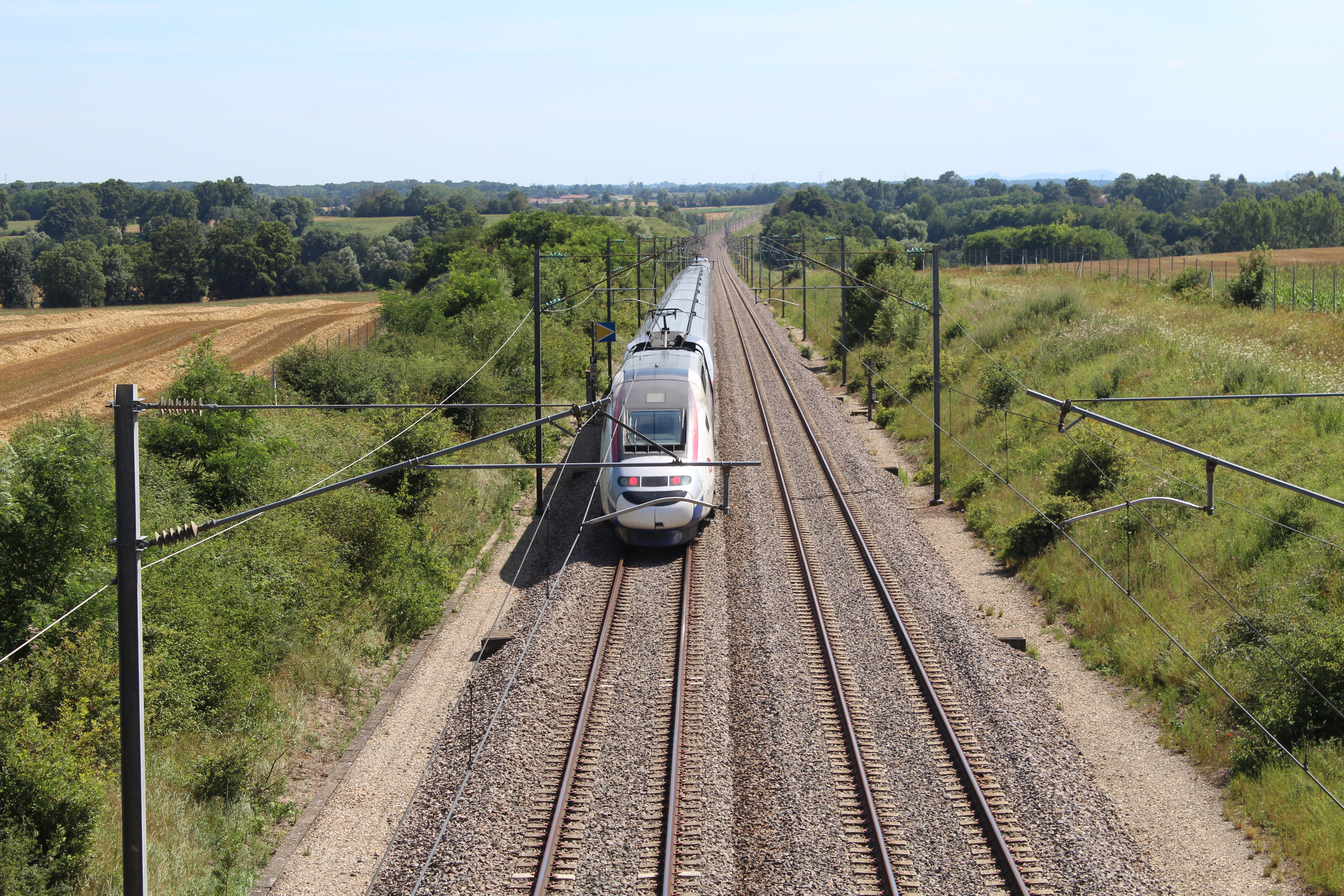 Ligne TGV Sud-Est à Cruzilles-lès-Mépillat.